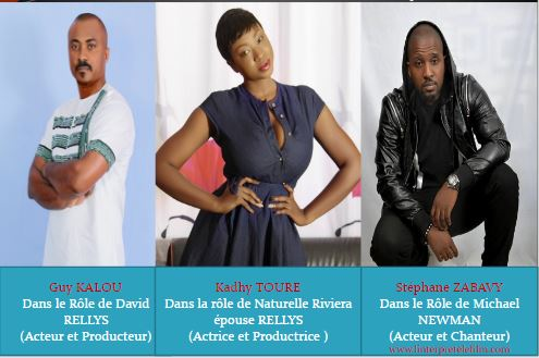 Les acteurs principaux du film l'interprète de l'ivoirienne Kadhy Touré